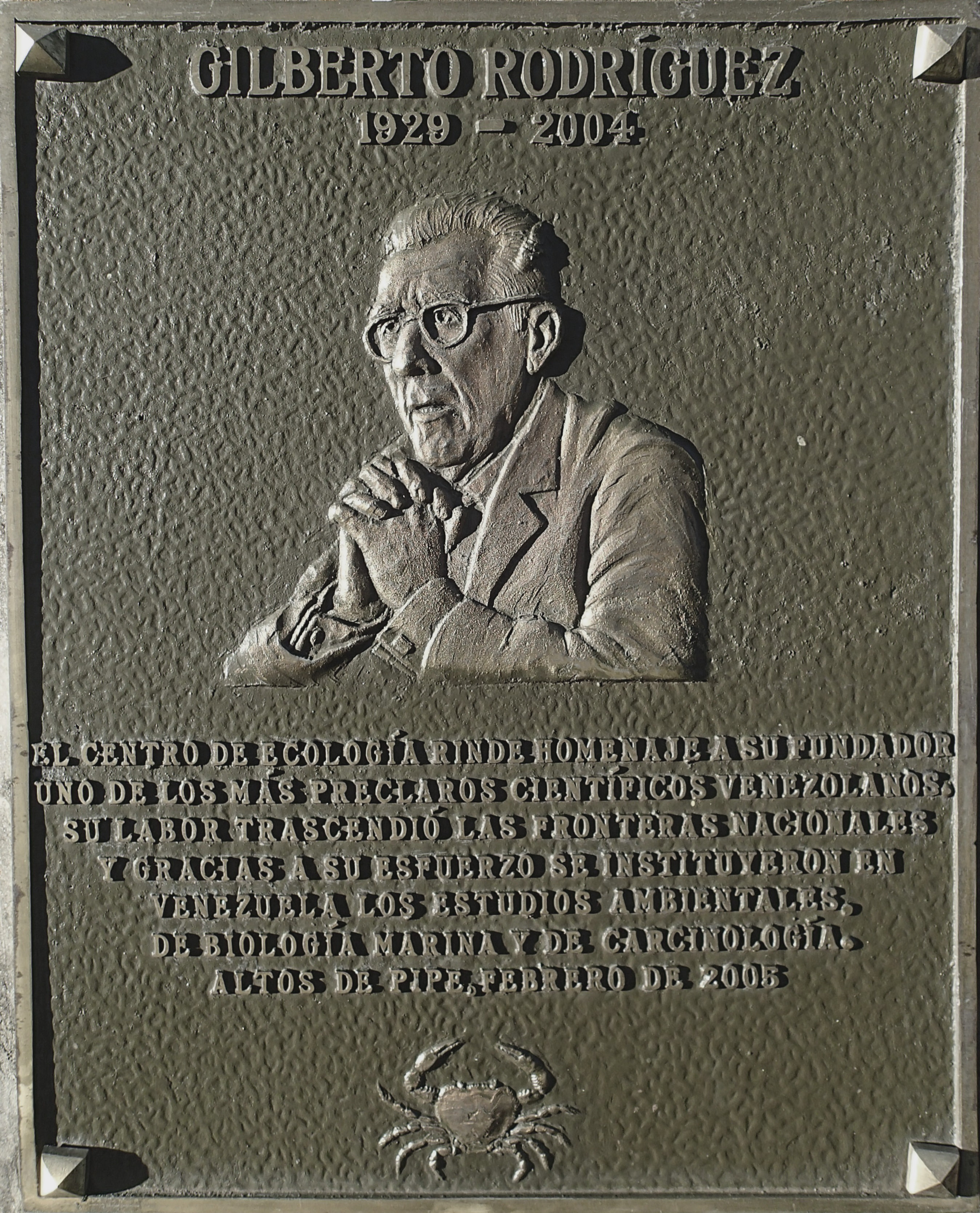 Gilberto Rodríguez (1929 - 2004) "El Centro de Ecología rinde homenaje a su fundador, uno de los más preclaros científicos venezolanos. Su labor trascendió las fronteras nacionales y gracias a su esfuerzo se instituyeron en Venezuela los estudios ambientales, de biología marina y de carcinología. Altos de Pipe, Febrero 2005" Placa ubicada en la entrada del Centro de Ecología del Instituto Venezolano de Investigaciones Científicas. Altos de Pipe, Venezuela.